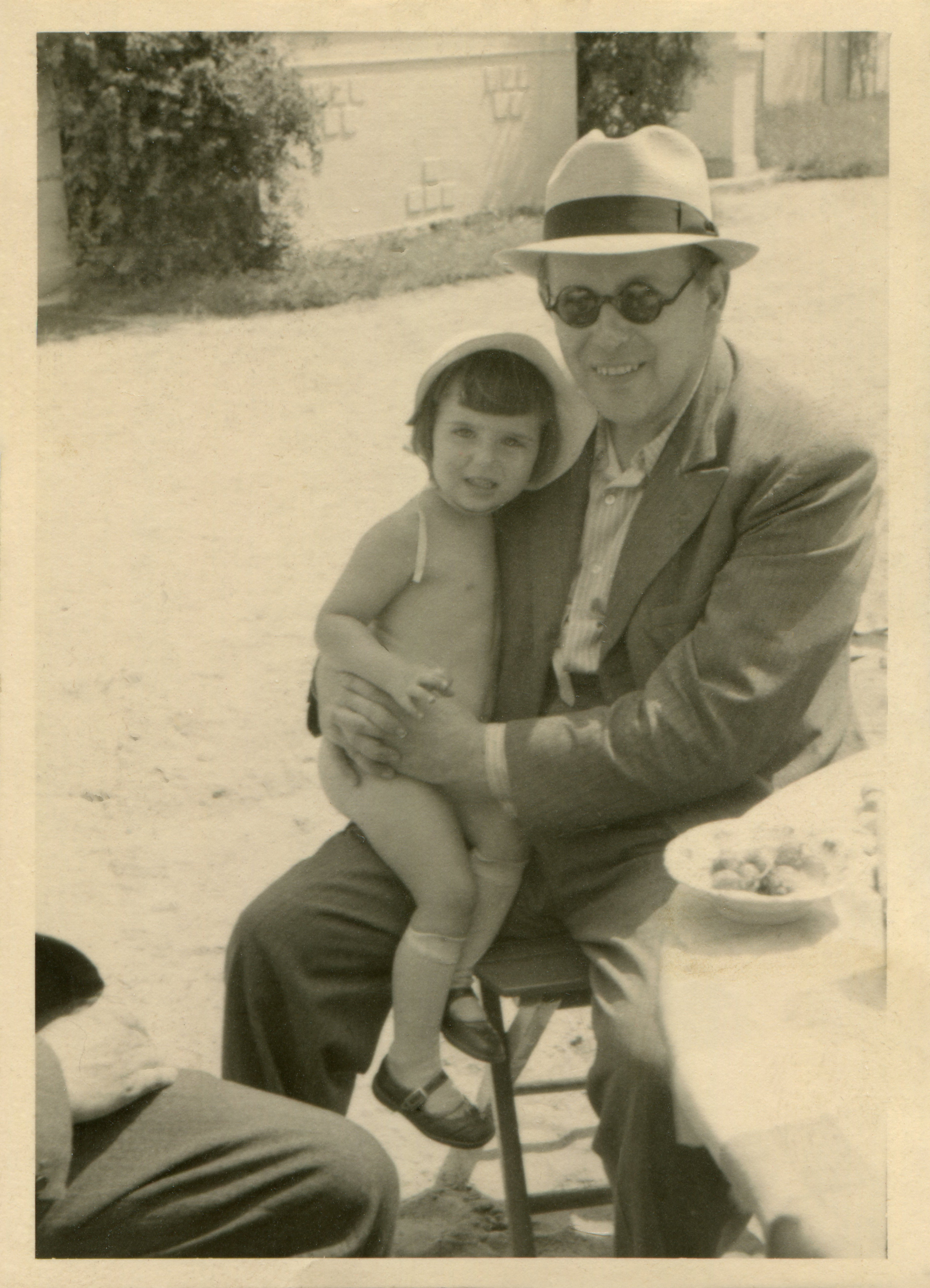 Váša Příhoda, Libuše Příhodová